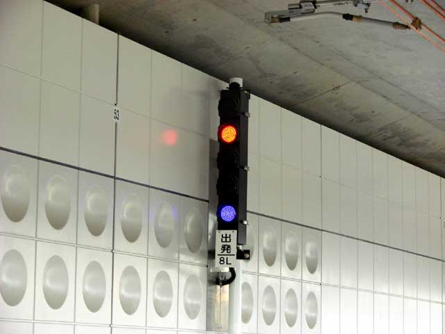 阪神電気鉄道 色灯式中継信号機